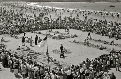 Hondarrezko gazteluen lehiaketa Kontxa hondartzan.